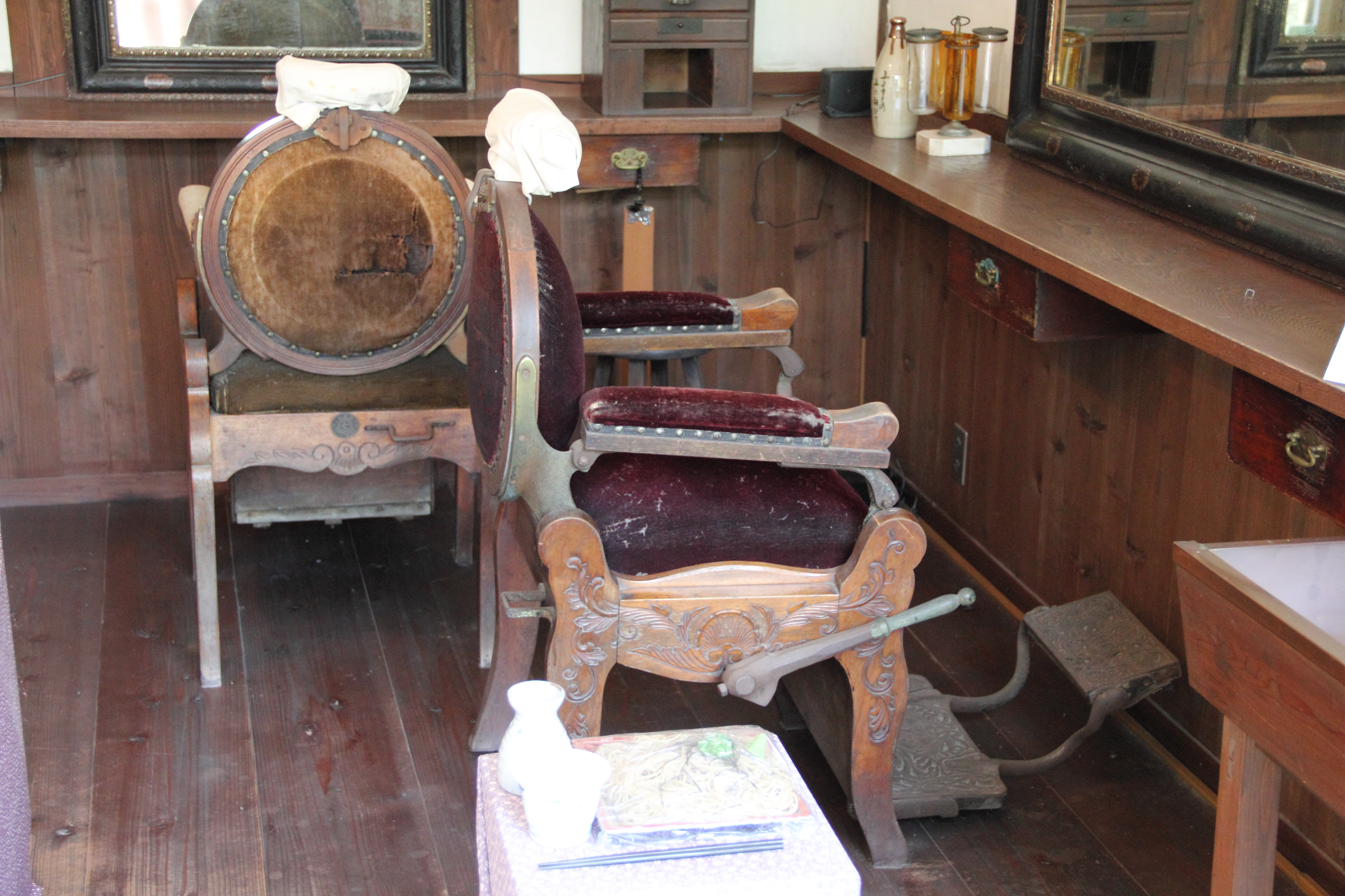 interior